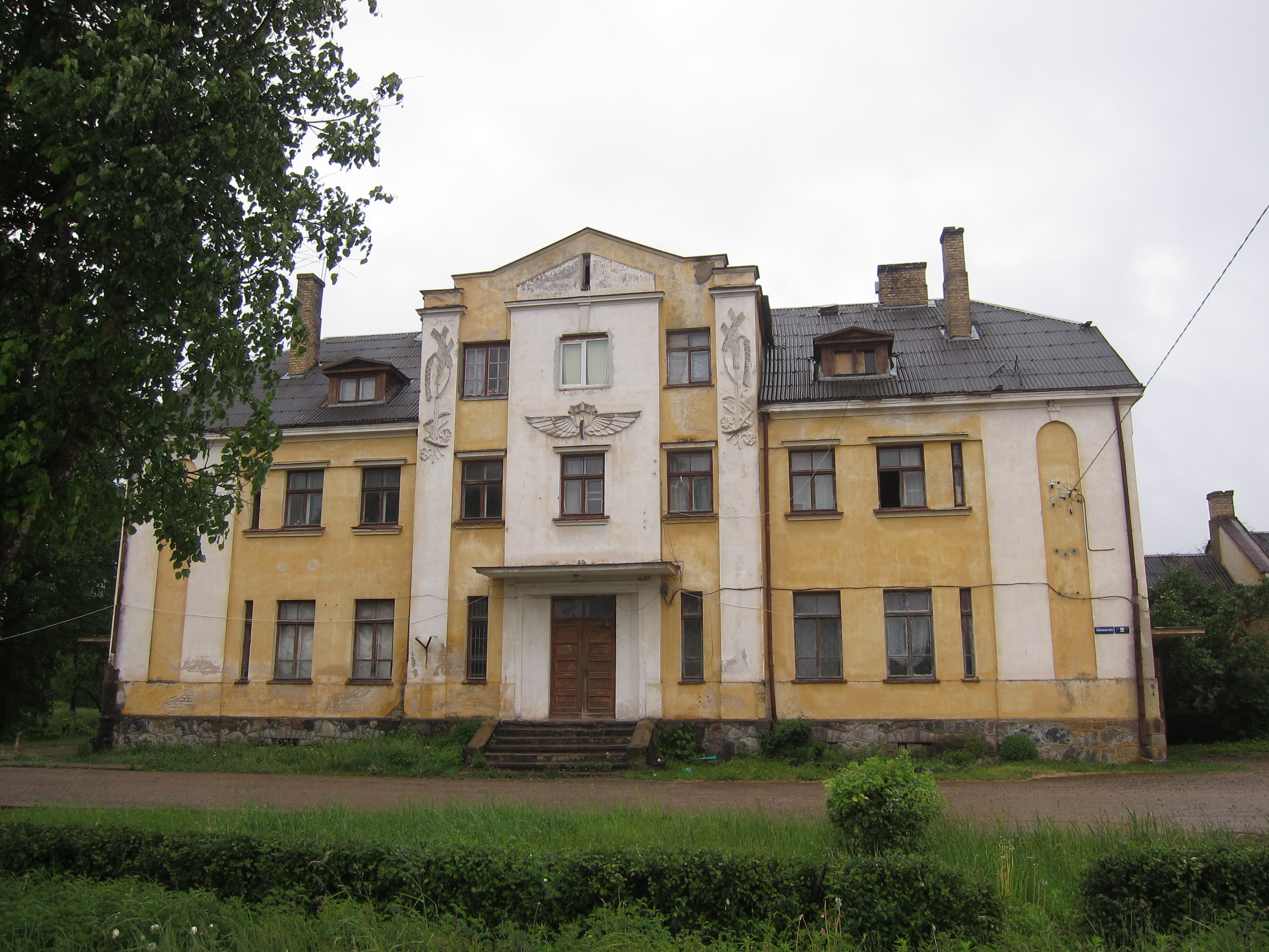 Lubānas stacijas ēka.